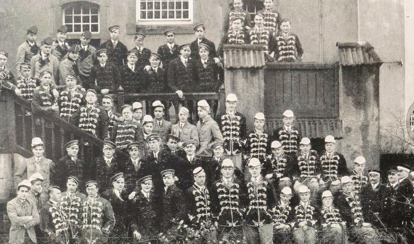 Corpsburschen des Freiburger Senioren-Convents am Corpshaus der Hasso-Borussia.